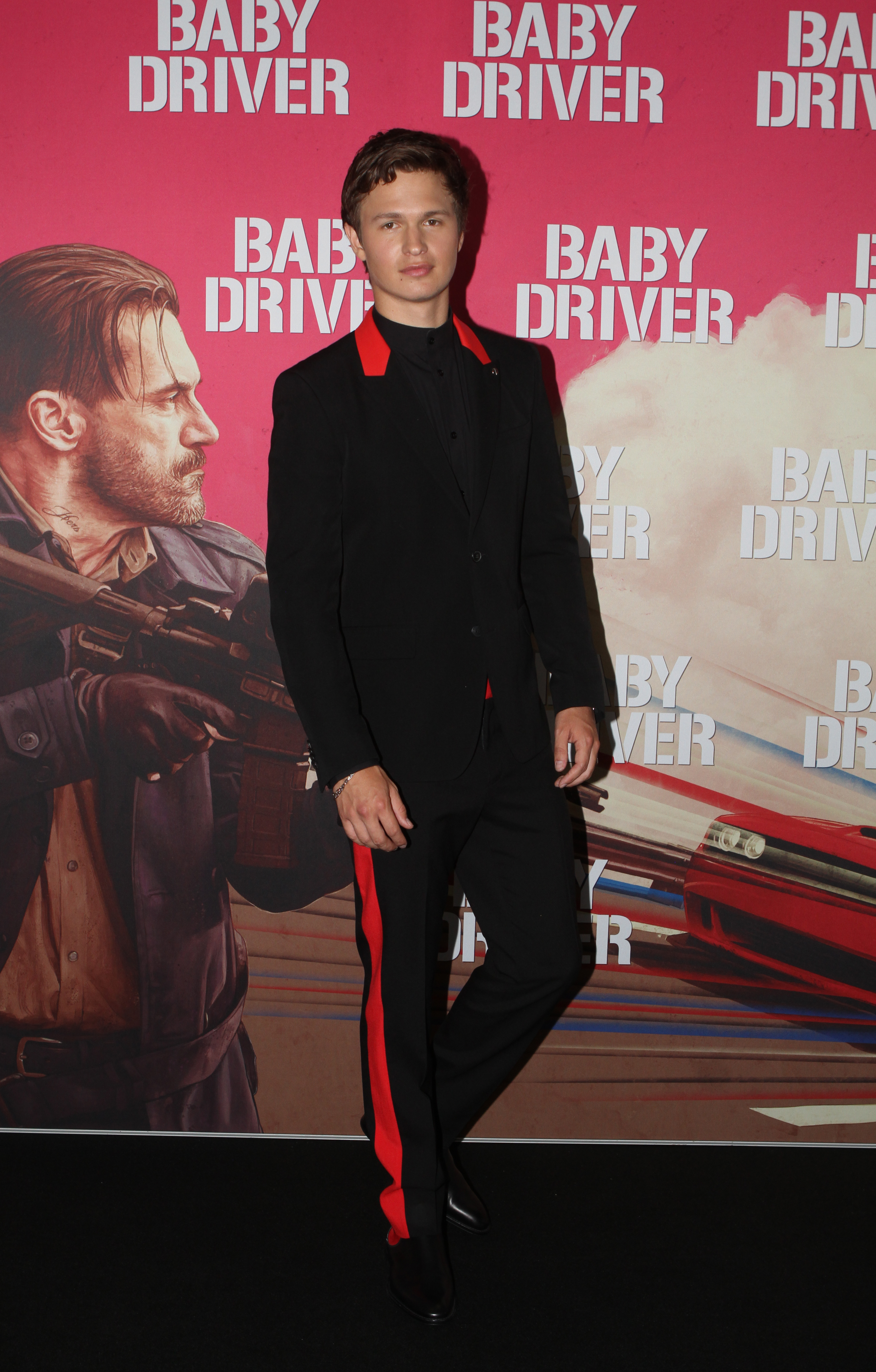 Ansel Elgort